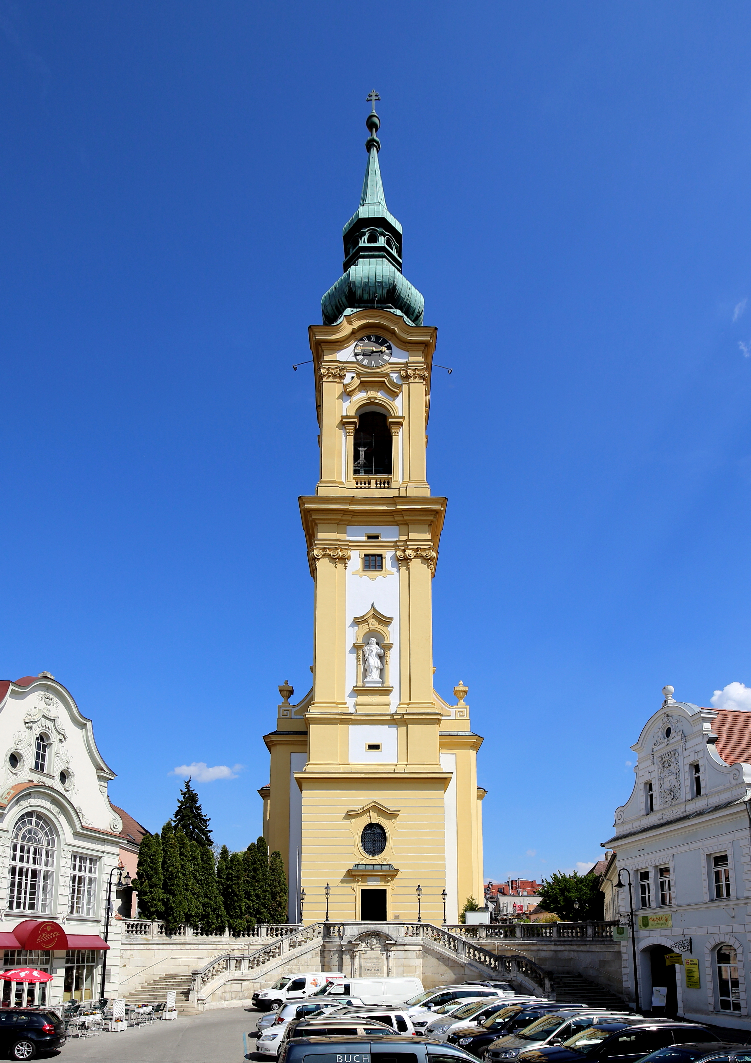 Westansicht der katholischen Stadtpfarrkirche hl. Stephan in der niederösterreichischen Stadt Stockerau. Eine spätbarocke-frühklassizistische Saalkirche auf einem Hügel inmitten der Altstadt. Der vorgestellte und stadtbildbeherrschende Westturm wurde von 1722 bis 1725 von dem Baumeister Franz Jänggl errichtet und ist mit 88 Meter der höchste Kirchturm Niederösterreichs. 1777/78 erfolgte der Abbruch des gotischen Langhauses und anschließend der Neubau durch den Wiener Baumeister Peter Mollner.